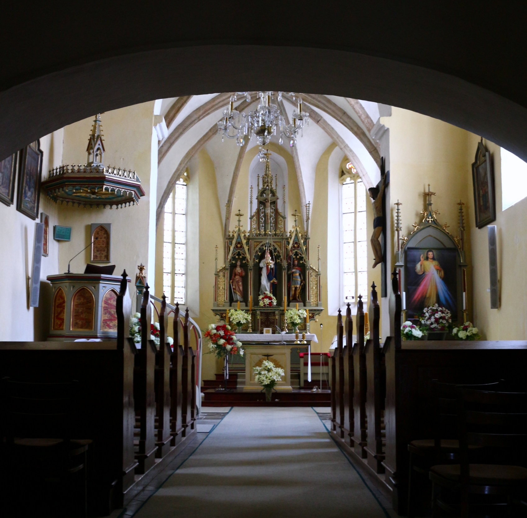 Keblov, náves